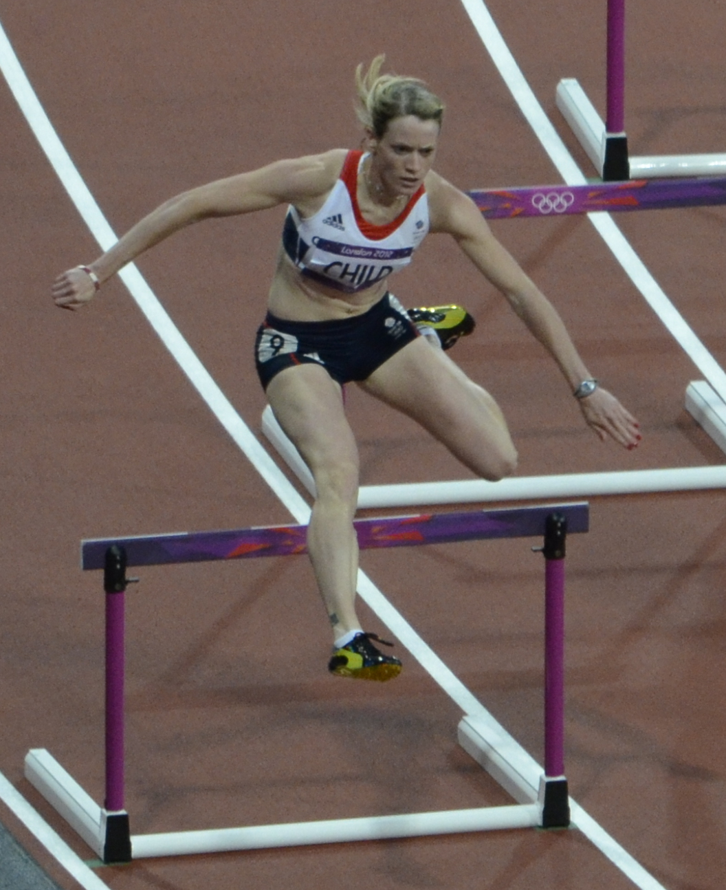 _D704556